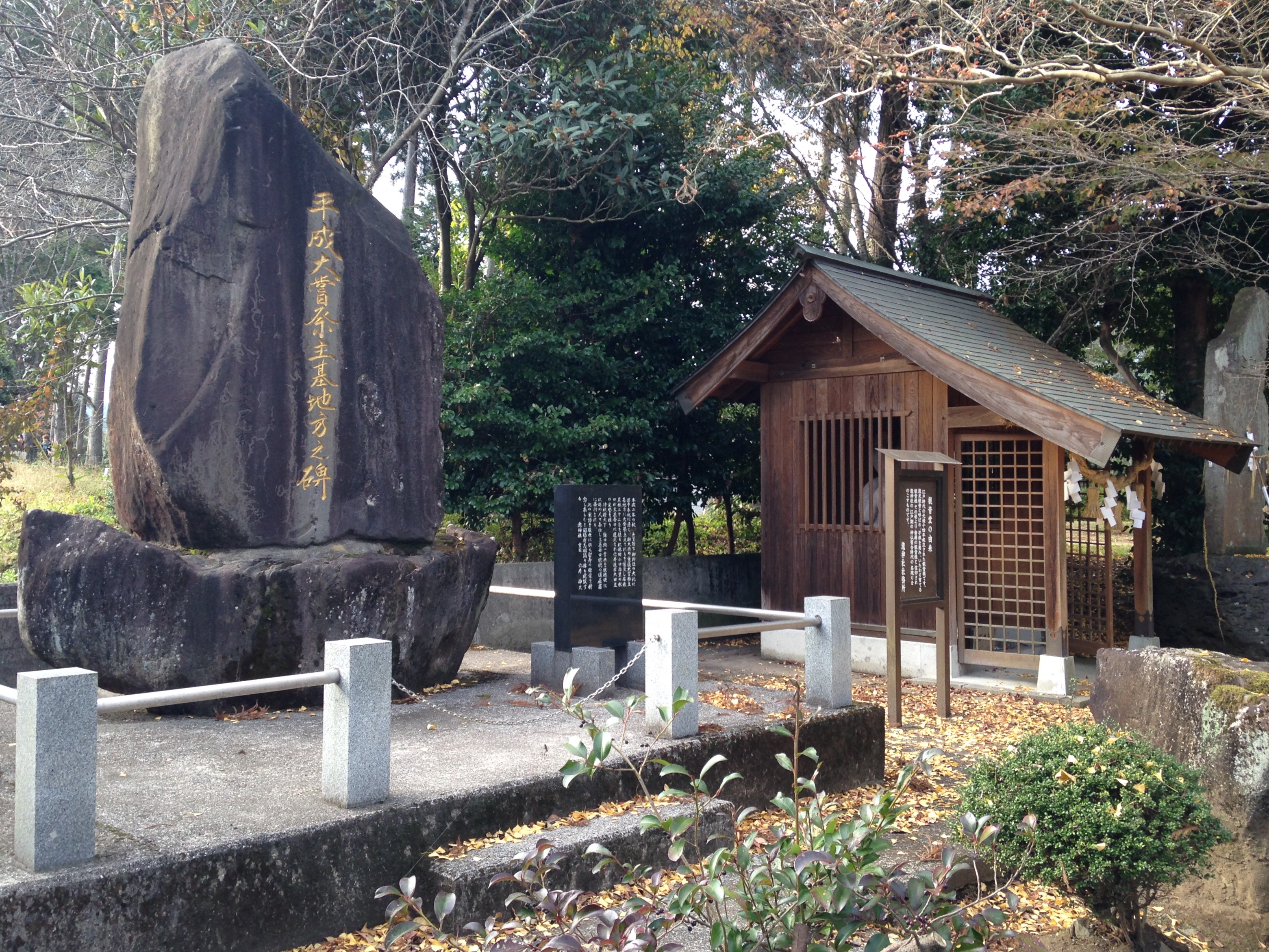 嵐山瀧神社・観音堂と「平成大嘗祭主基地方之碑」